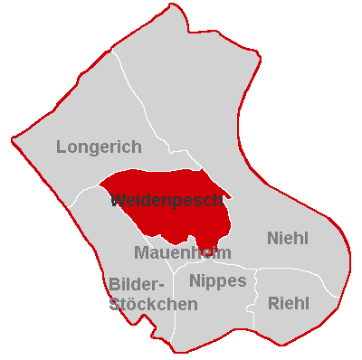 Lagekarte Weidenpesch im Stadtbezirk Köln-Nippes